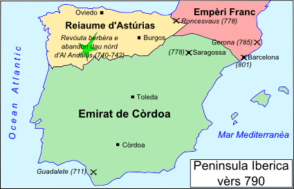 Peninsula Iberica vèrs 790.